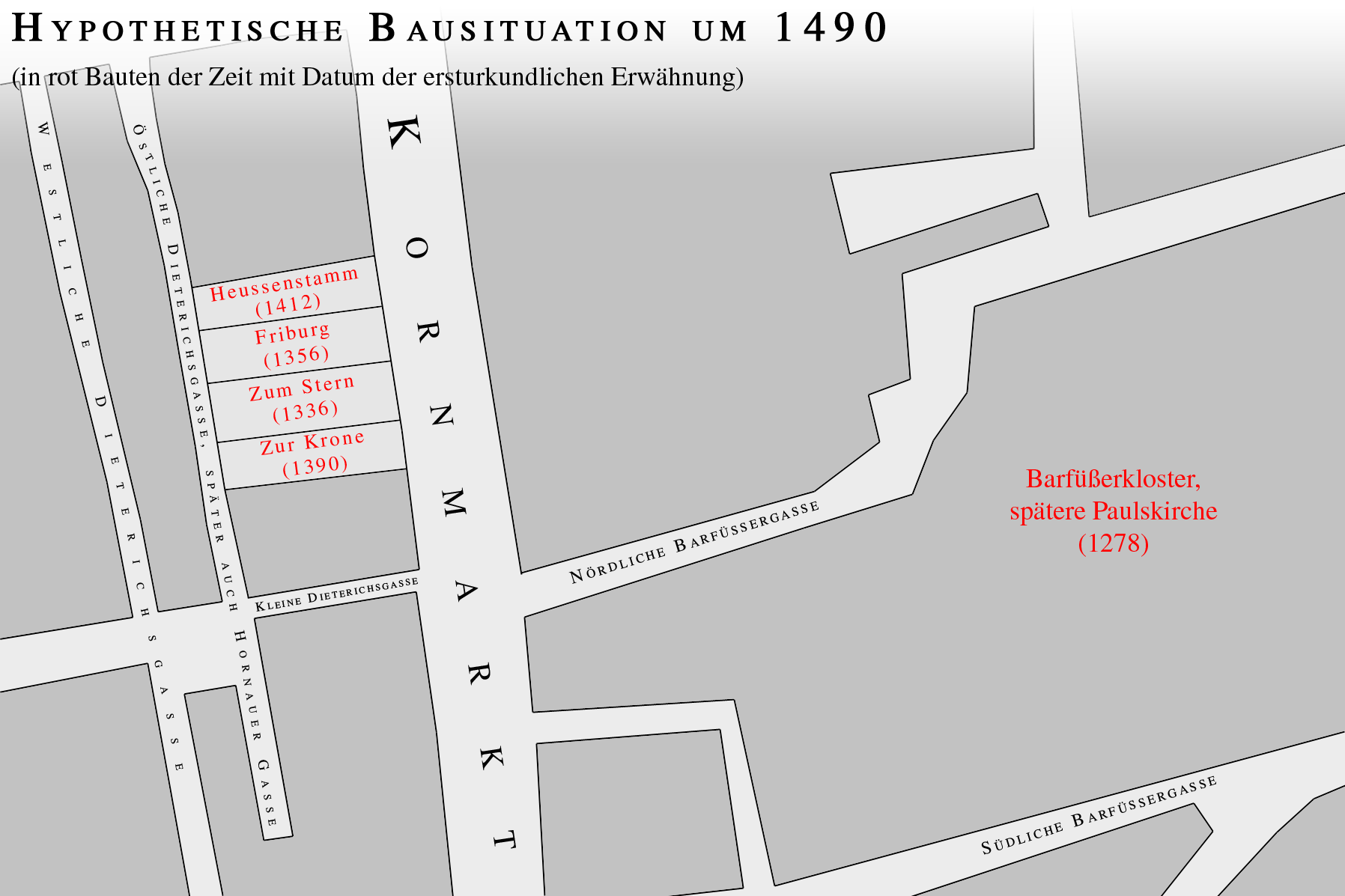 Hypothetische Bausituation am Kornmarkt in der Altstadt von Frankfurt am Main um 1490. Selber gezeichnet, GFDL-Lizenz.